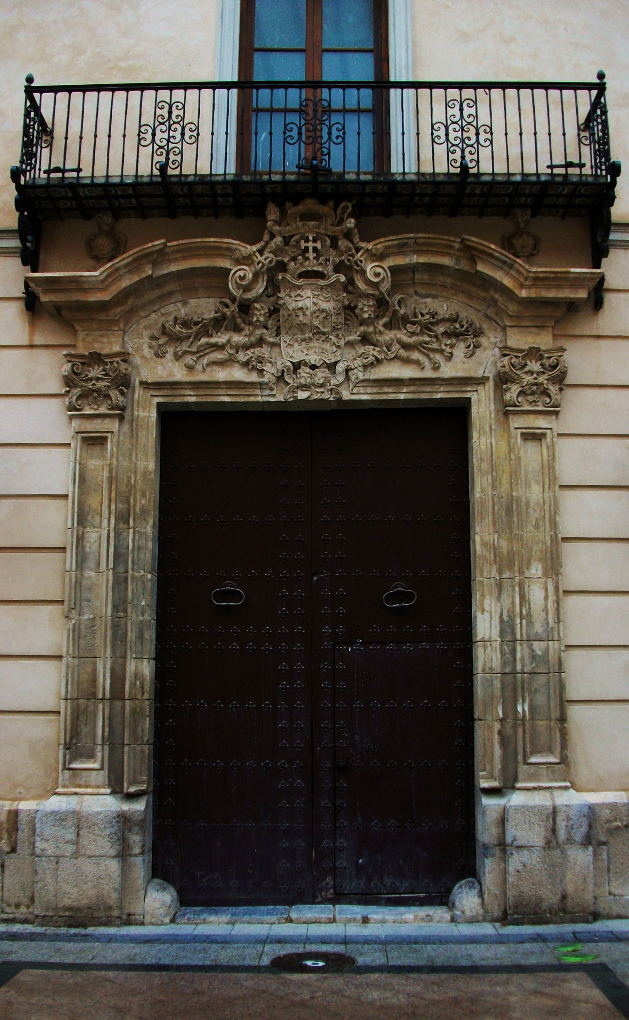 Portada del palau episcopal d'Oriola.